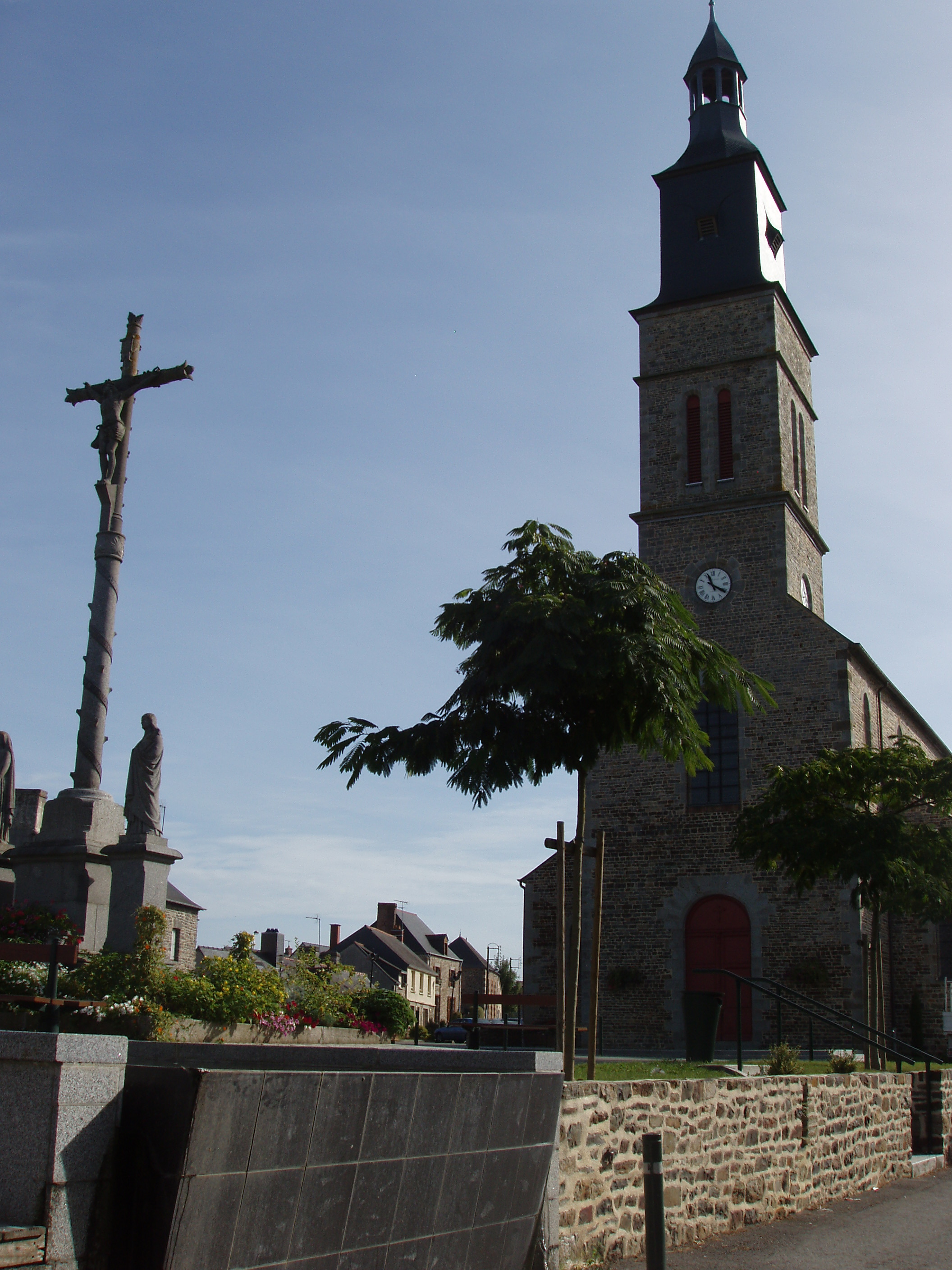 église et place du bourg de Saint-M'Hervé